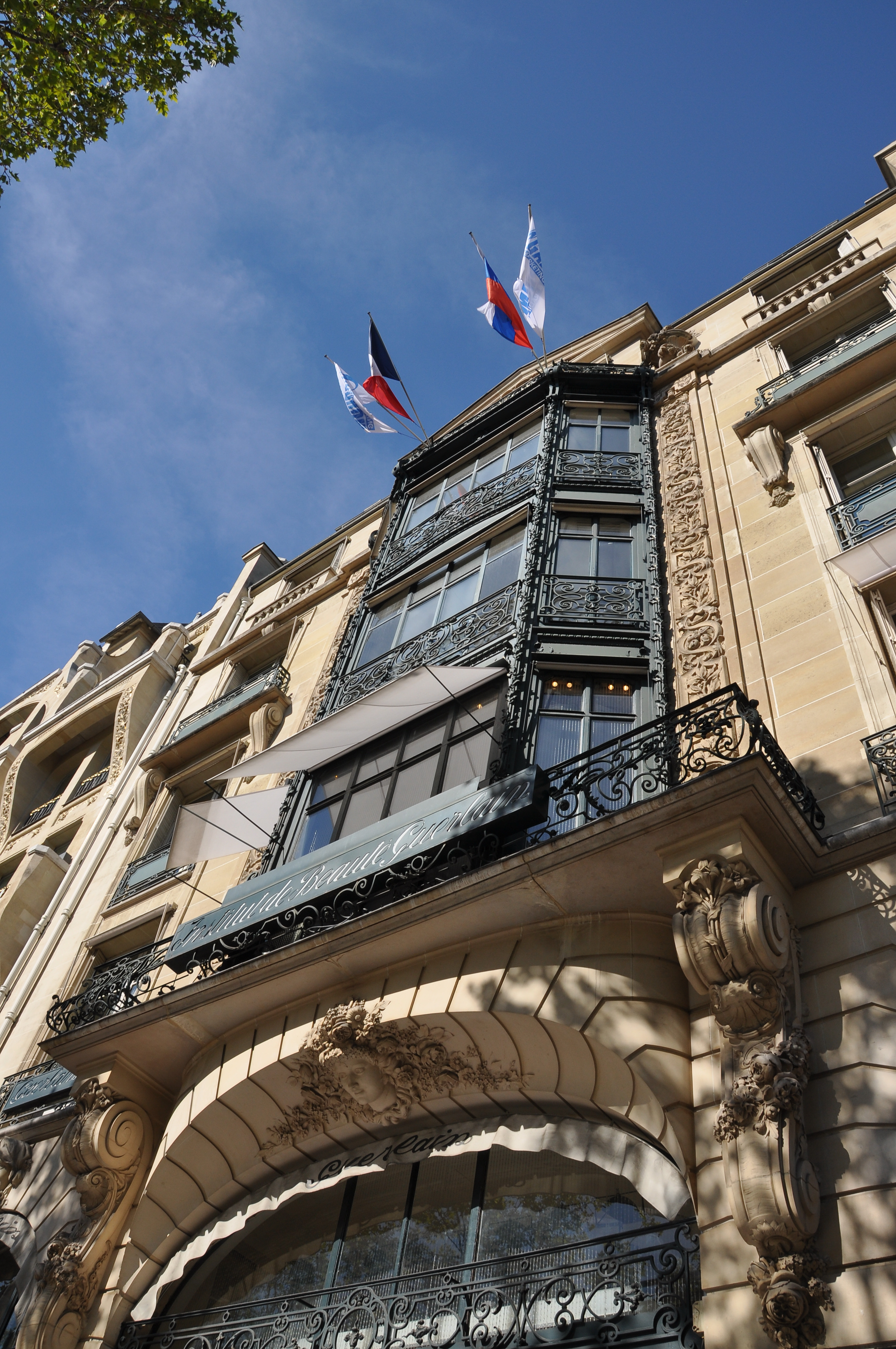 Building located at 68 avenue des Champs-Élysées in the 8th arrondissement of Paris in France. Built in 1914 for perfumers Jacques and Pierre Guerlain and registered historical monuments by the French Ministry of Culture.